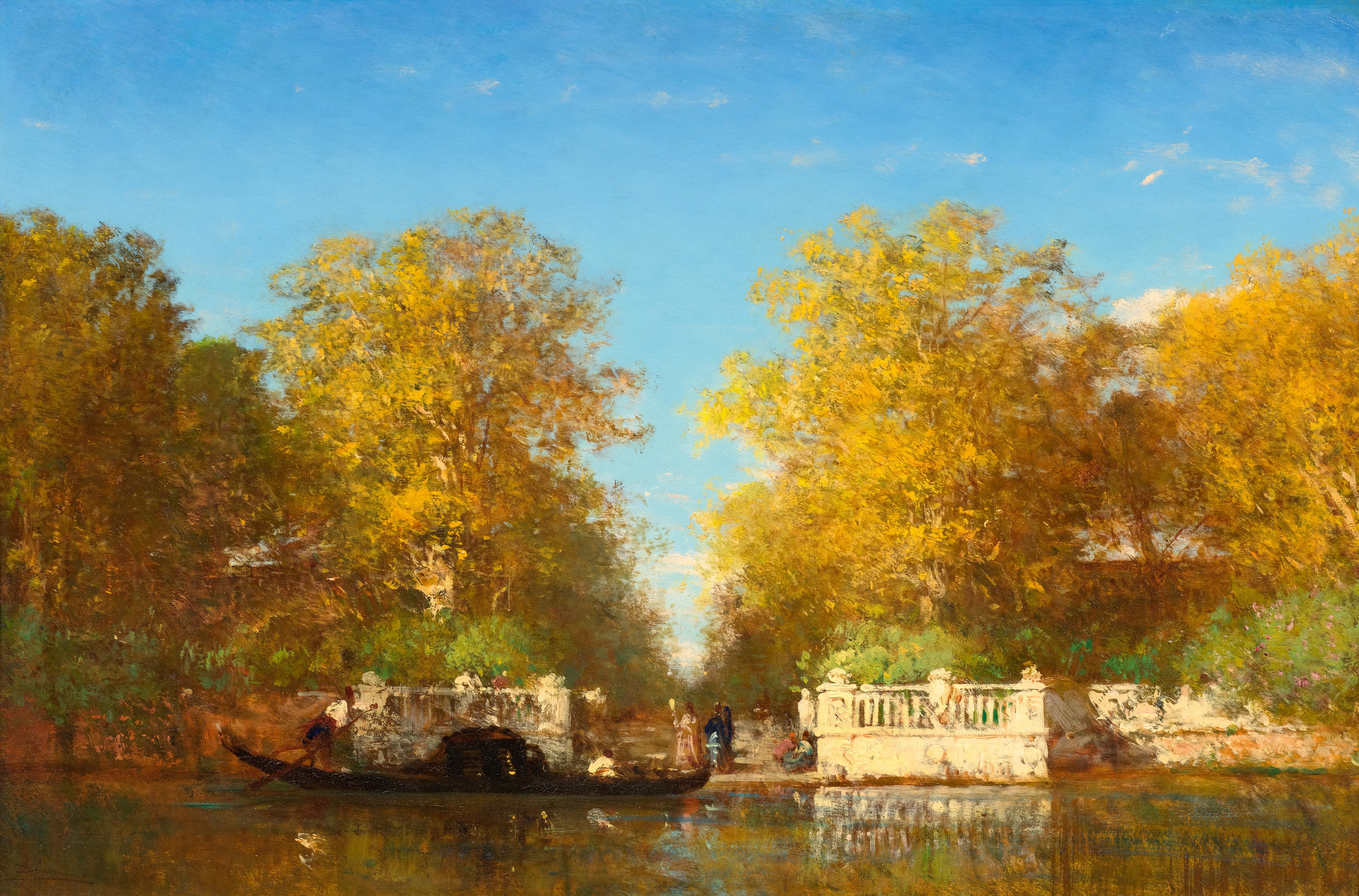 Venise, entrée des jardins français. Öl auf Holz. Unten links signiert: Ziem. 53 x 79,4 cm.